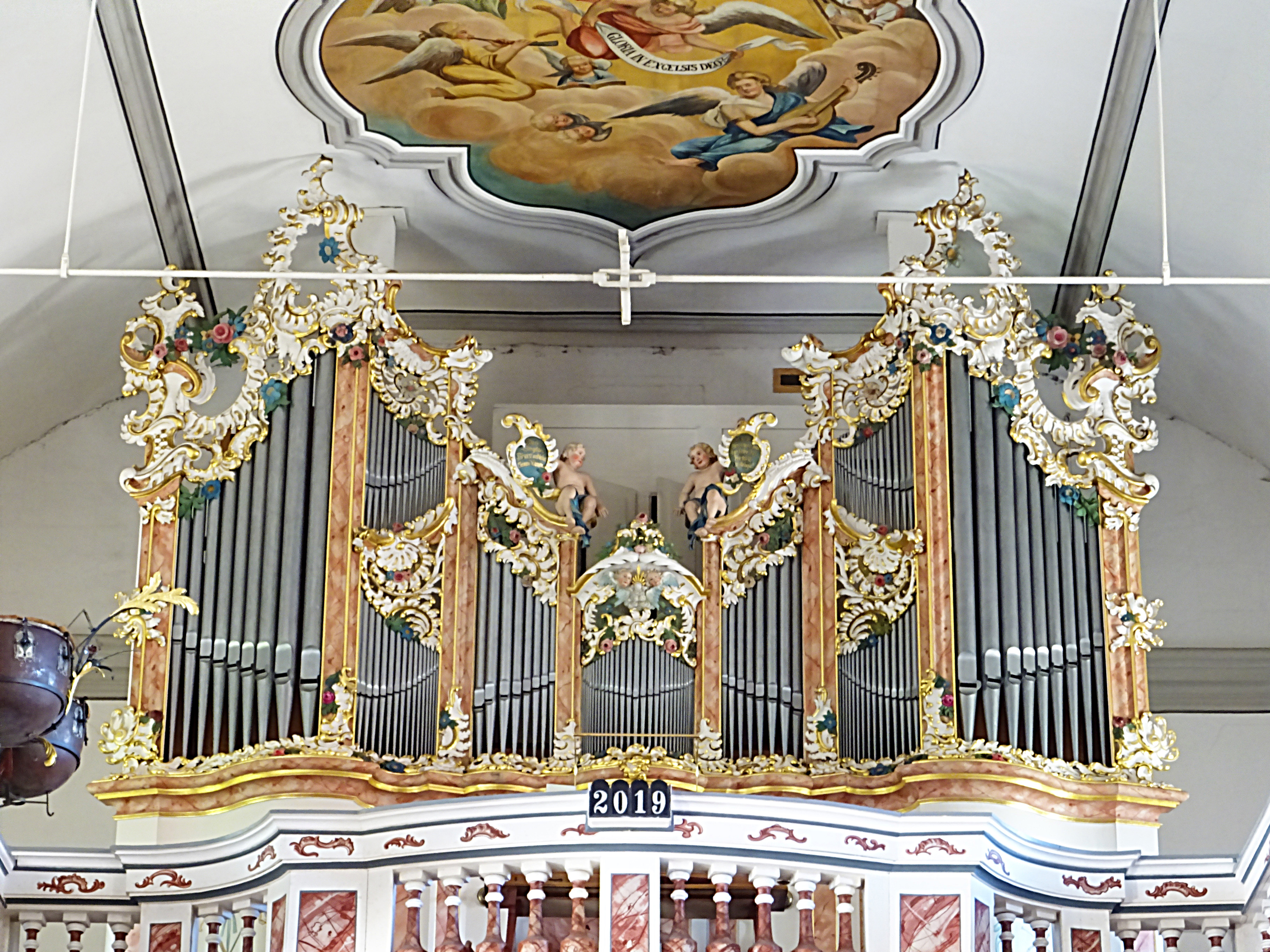 Orgel von Richard Voigt aus Halberstadt (1927, II/P20) im historischen Prospekt der Vorgängerorgel von Georg Wilhelm Kappauf (Saalfeld) und den Gebr. Wagner (Schmiedefeld) (1778–1784) in der Gertrudiskirche in Saalfeld-Graba